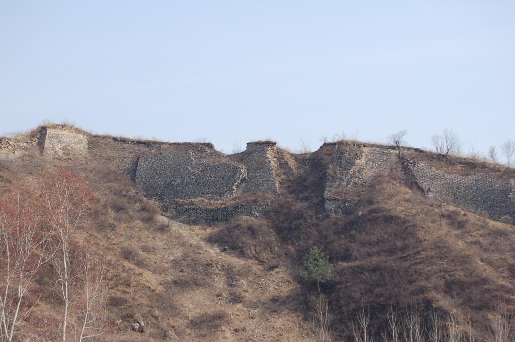 紫荊關長城